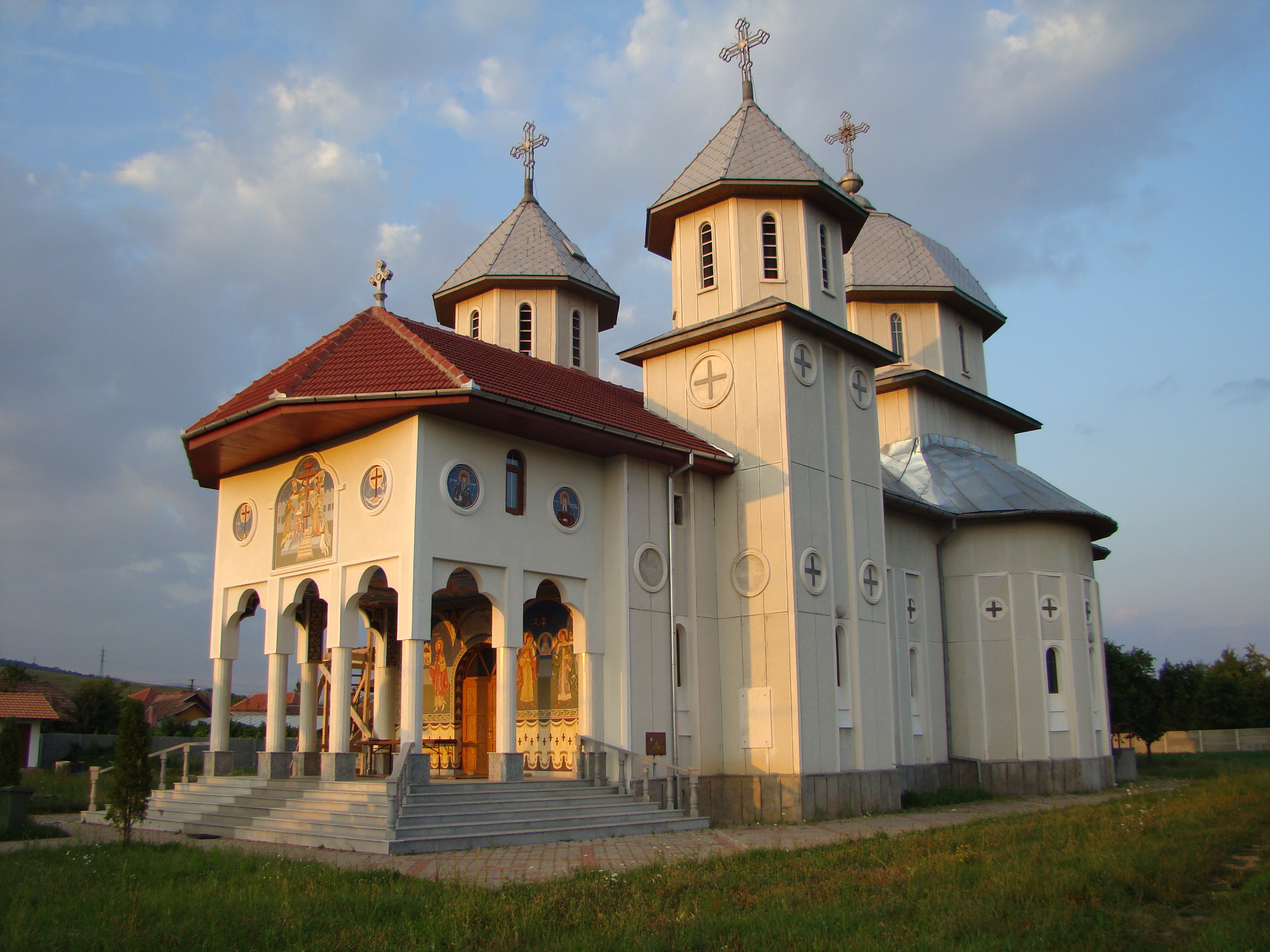 Biserica nouă de zid , comuna Șoimuș, județul Hunedoara